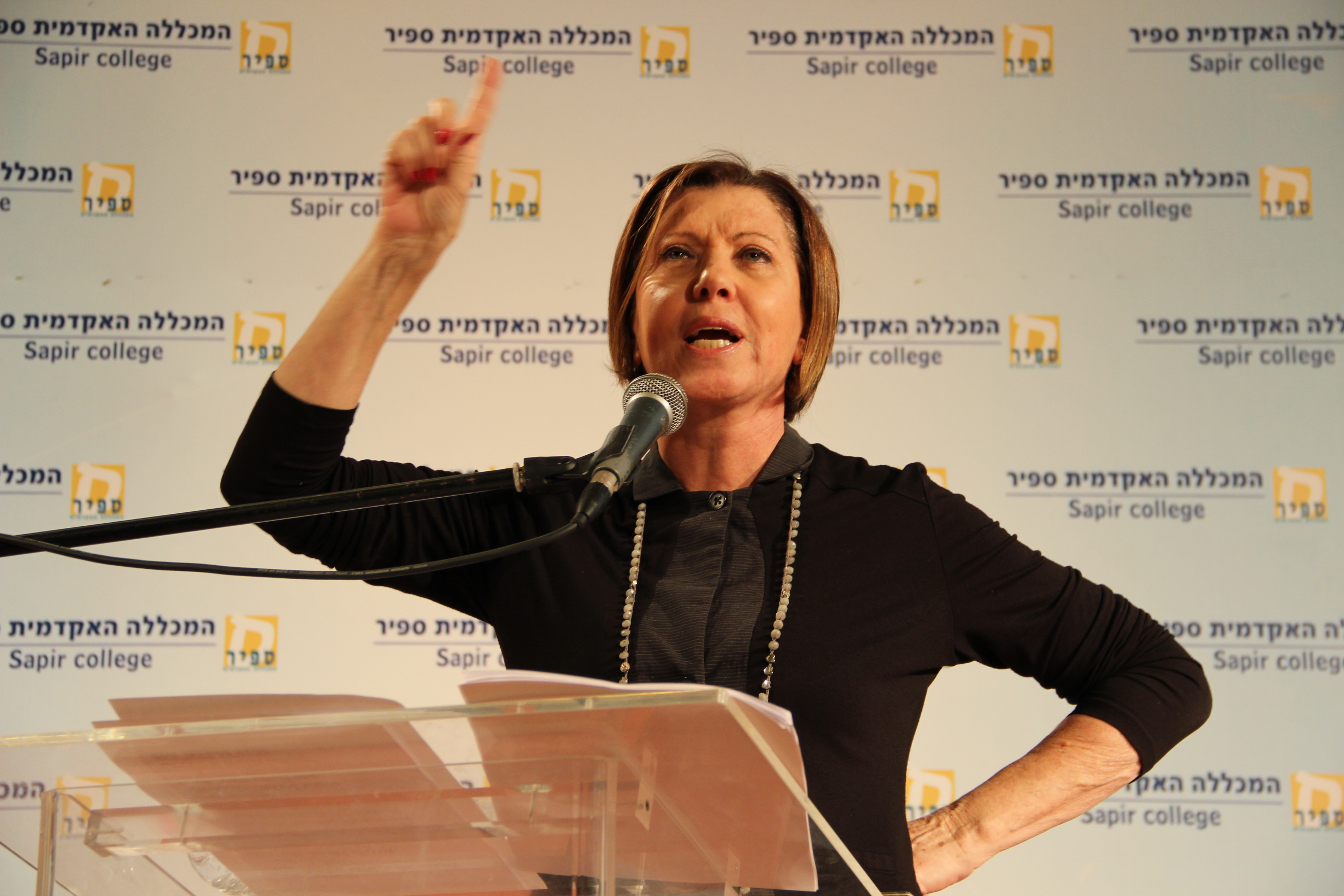 כנס שדרות לחברה במכללה האקדמית ספיר ובעיר שדרות 2015